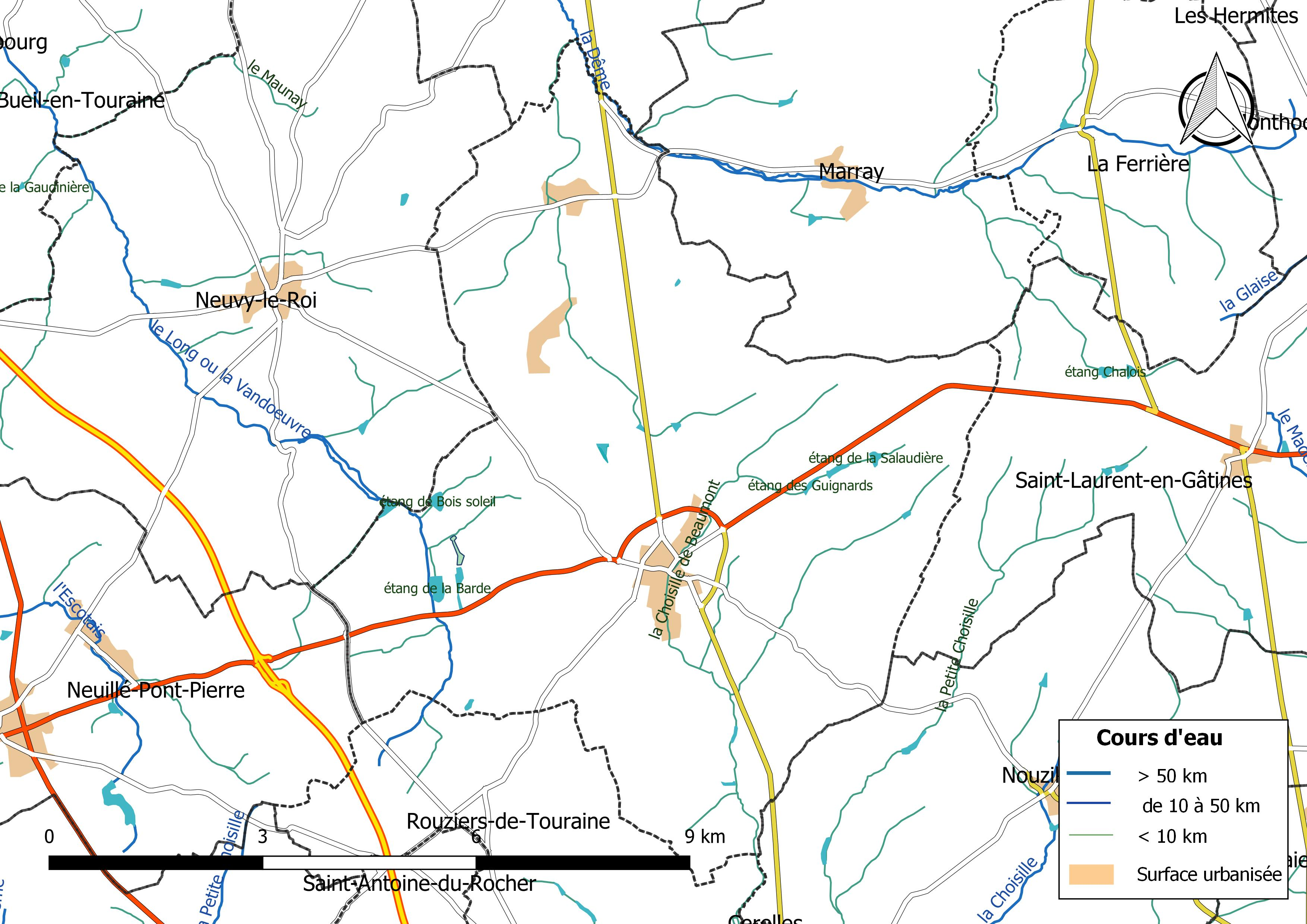 Carte du réseau hydrographique de la commune de Beaumont-Louestault (France).